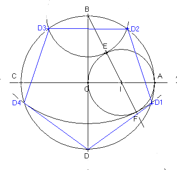 Construction d'un pentagone à la règle et au compas. Image personnelle. Licence GFDL. Utilisateur:HB